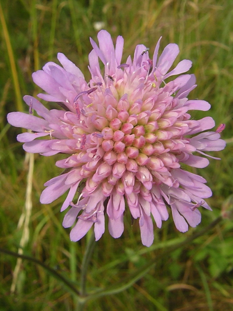 Кnautia arvensis (L.) Coult. Russia, Ivanovo region. Короставник полевой. Россия, Ивановская область.